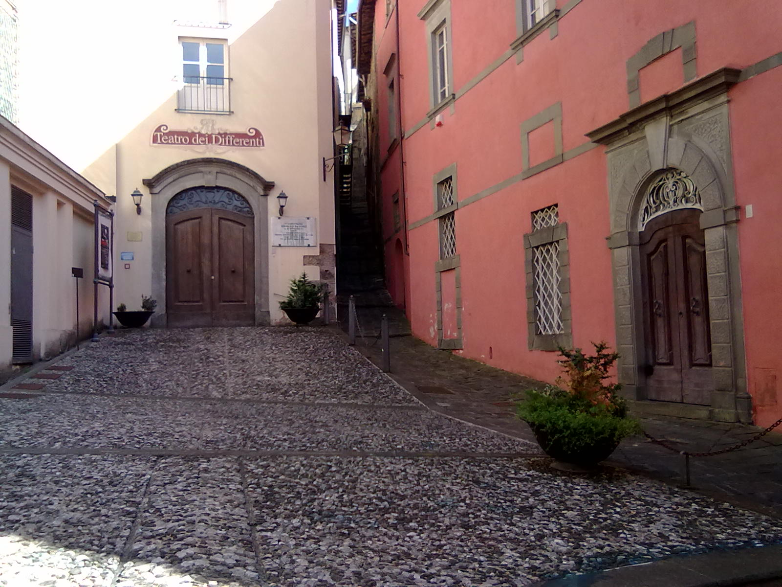 55051 Barga LU, Italy